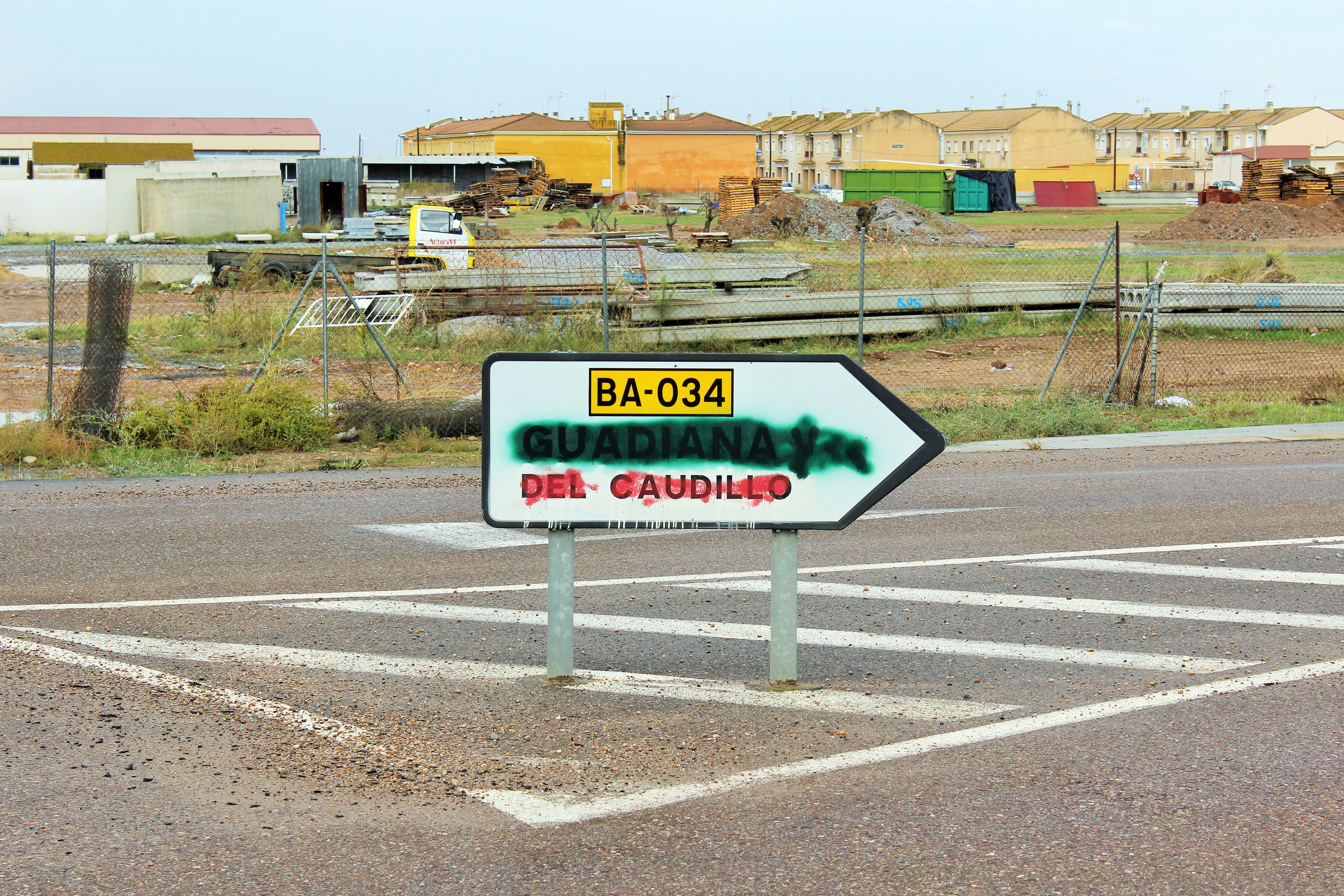 Guadiana del Caudillo-Cartel indicativo